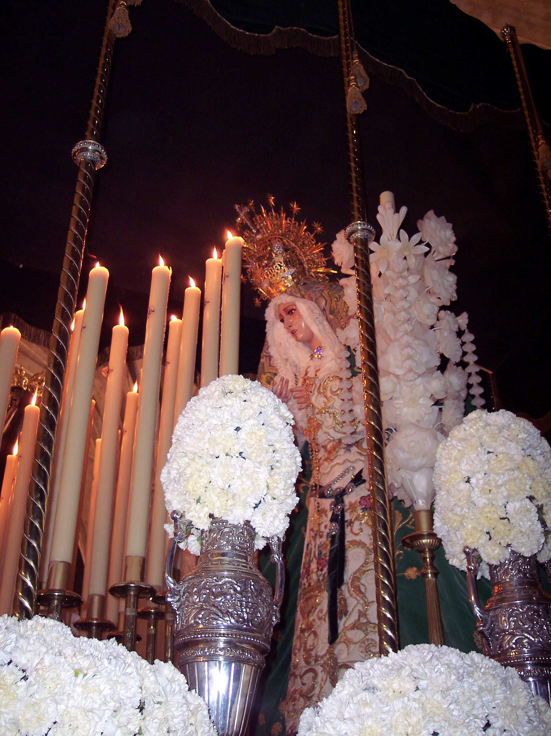 Ntra. Sra. de la Esperanza. Hermandad Dominicana del Stmo. Cristo de la Buena Muerte. Salamanca (España)